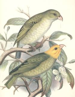 O'U (Psittirostra psittacea)